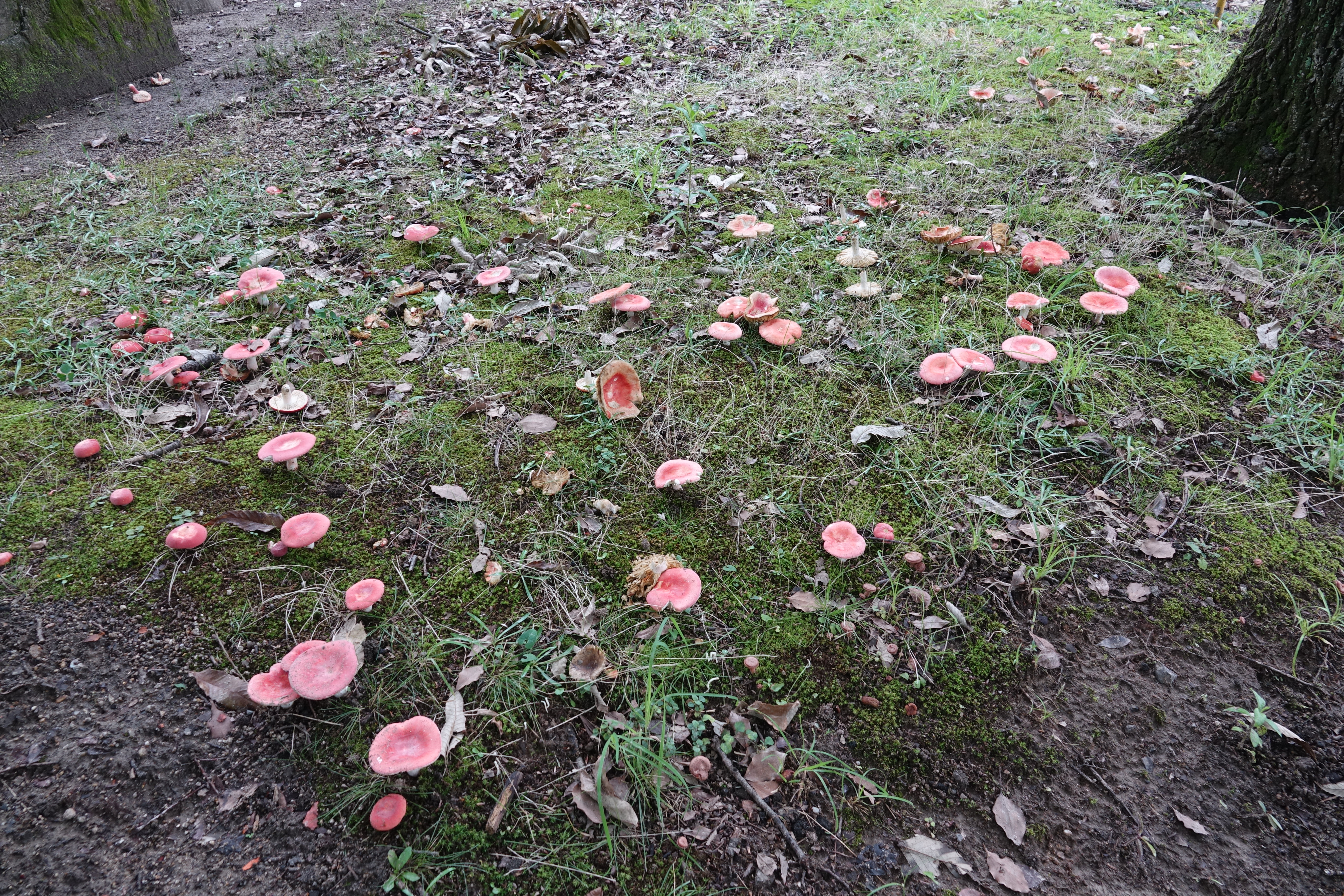 日本の本州、東海地方 公園にて